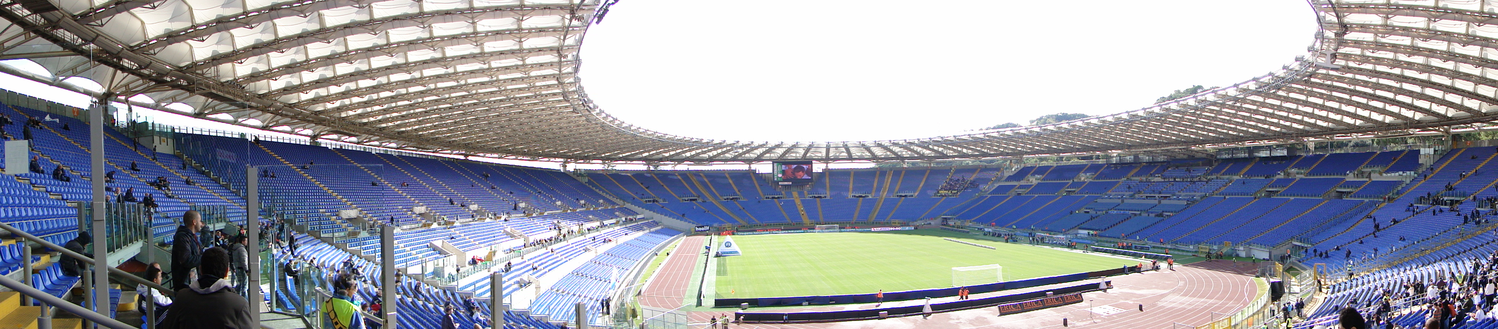 Estadio Olímpico de Roma